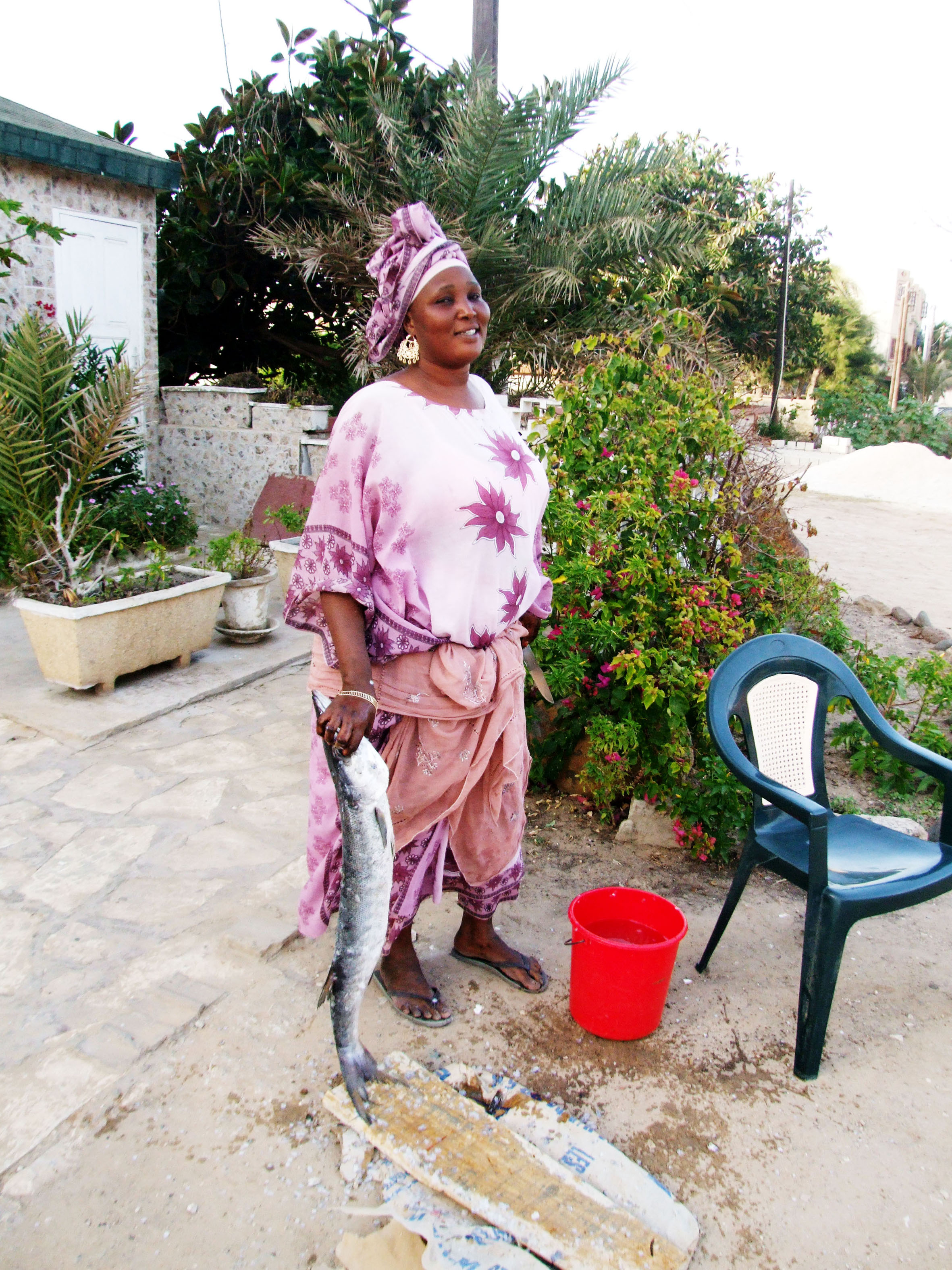 Une vendeuse de poisson (porte-à-porte) à Yoff-Tonghor (Dakar, Sénégal)